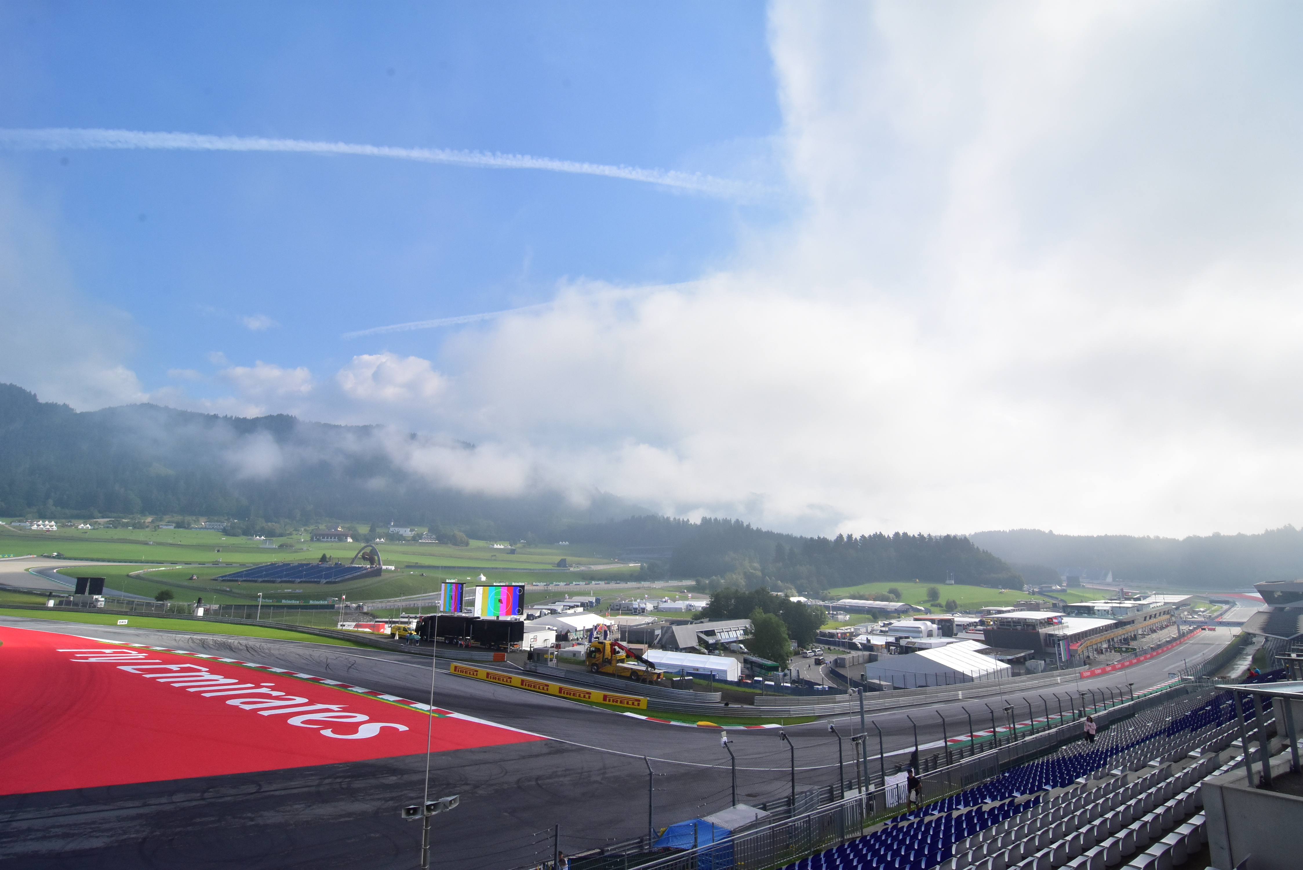 2018 Austrian Grand Prix.